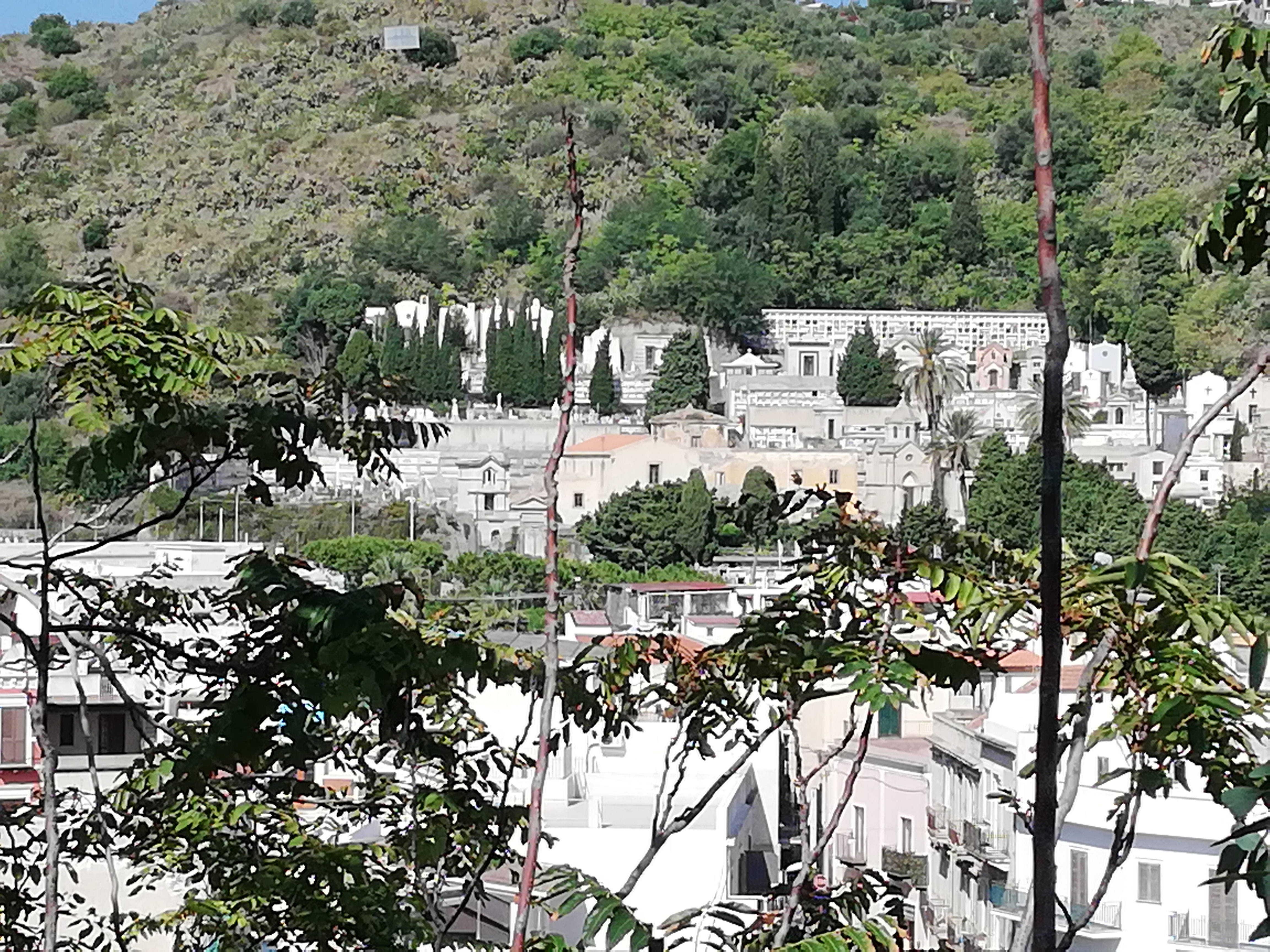 Chiesa di Santa Maria Assunta dell'Ordine dei frati minori cappuccini e cimitero cittadino di Lipari